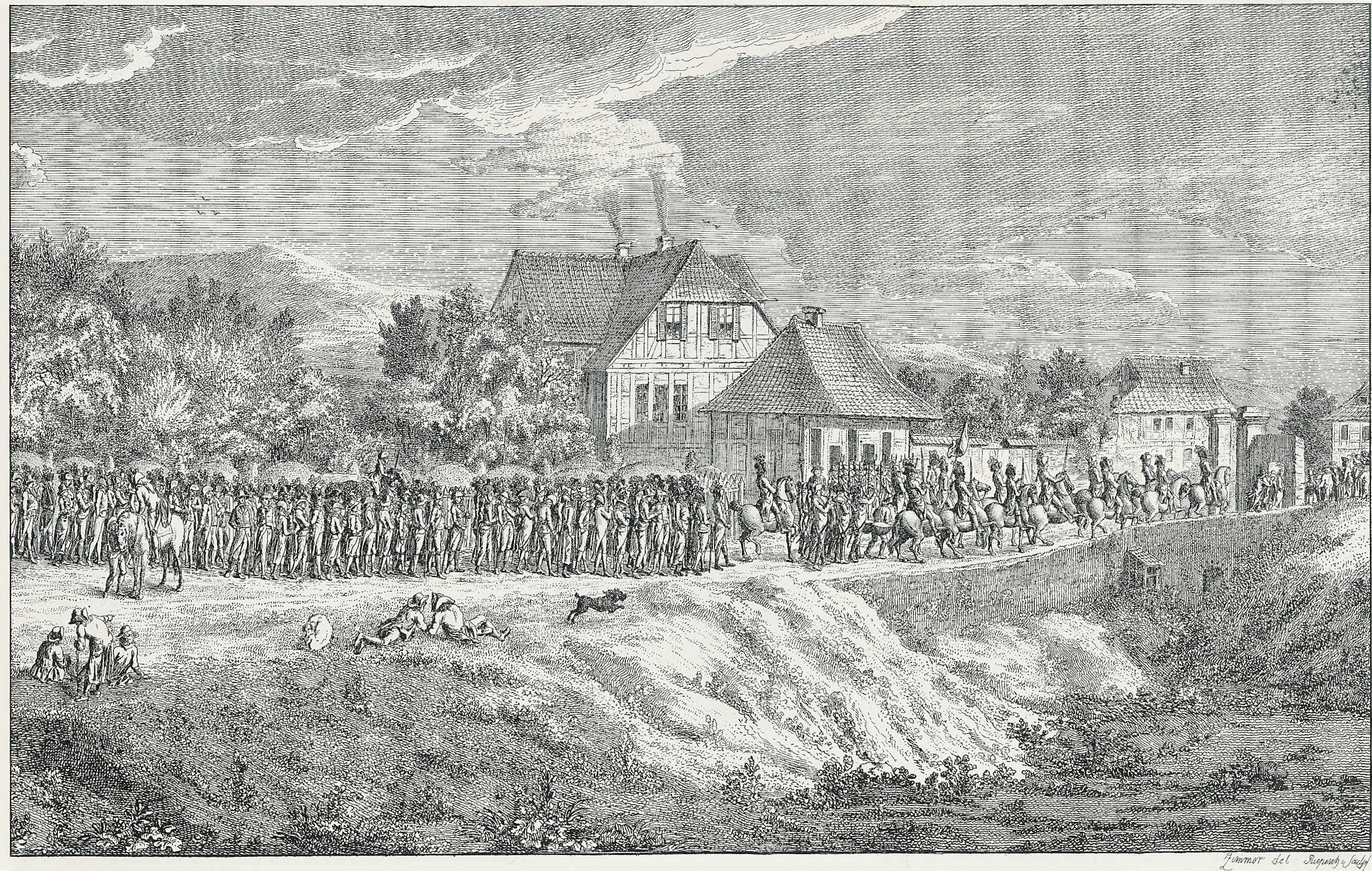 Einzug der Göttinger Studenten, Rückkehr vom Auszug zum Kerstlingeröder Feld, 1790, Kupferstich von Riepenhausen nach einer Zeichnung von Zimmer